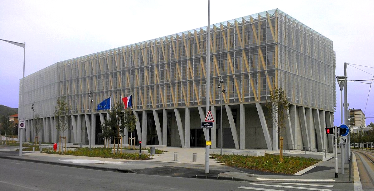 Conseil régional d'Auvergne (image améliorée)